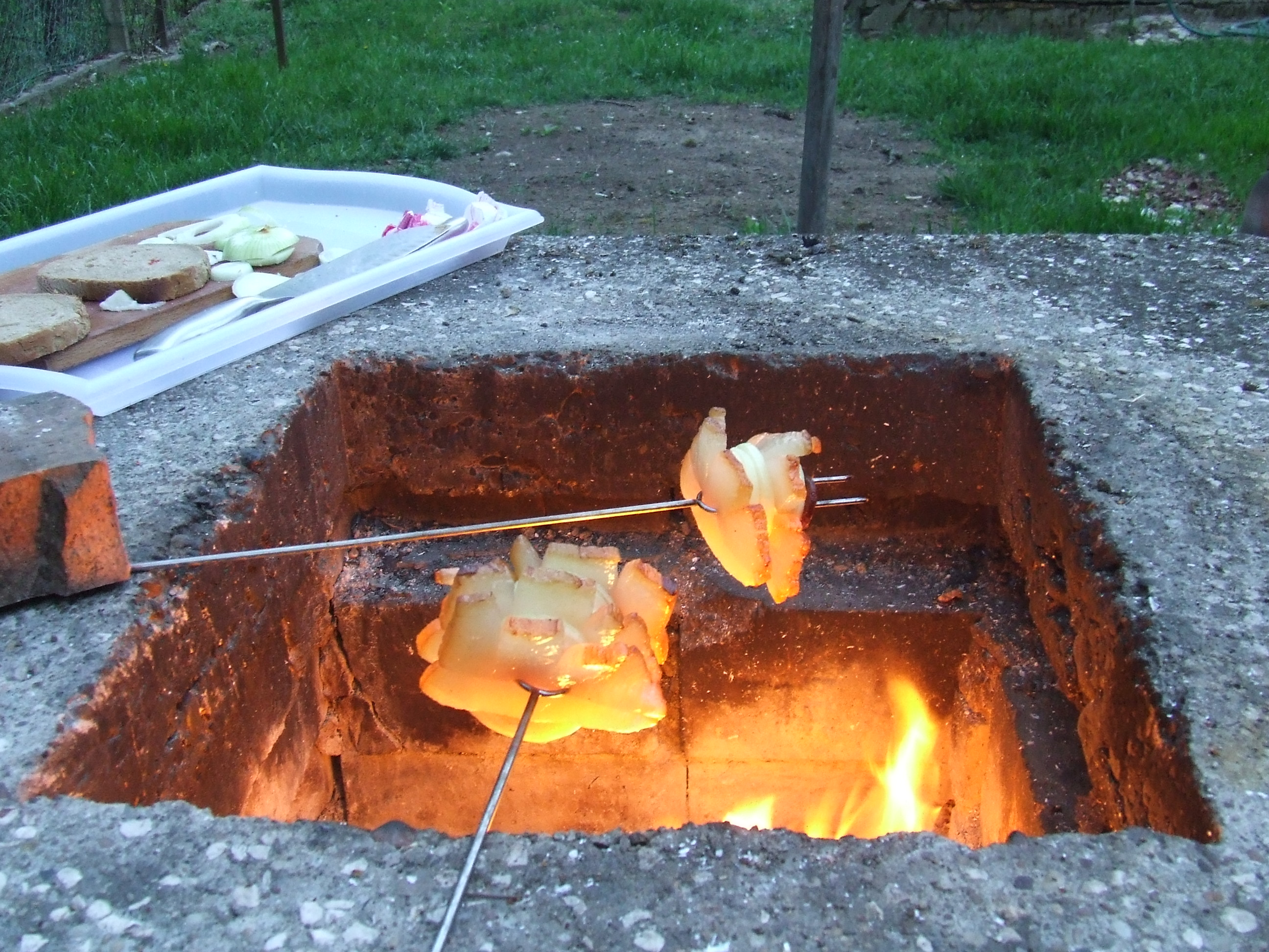 szalonnasütés